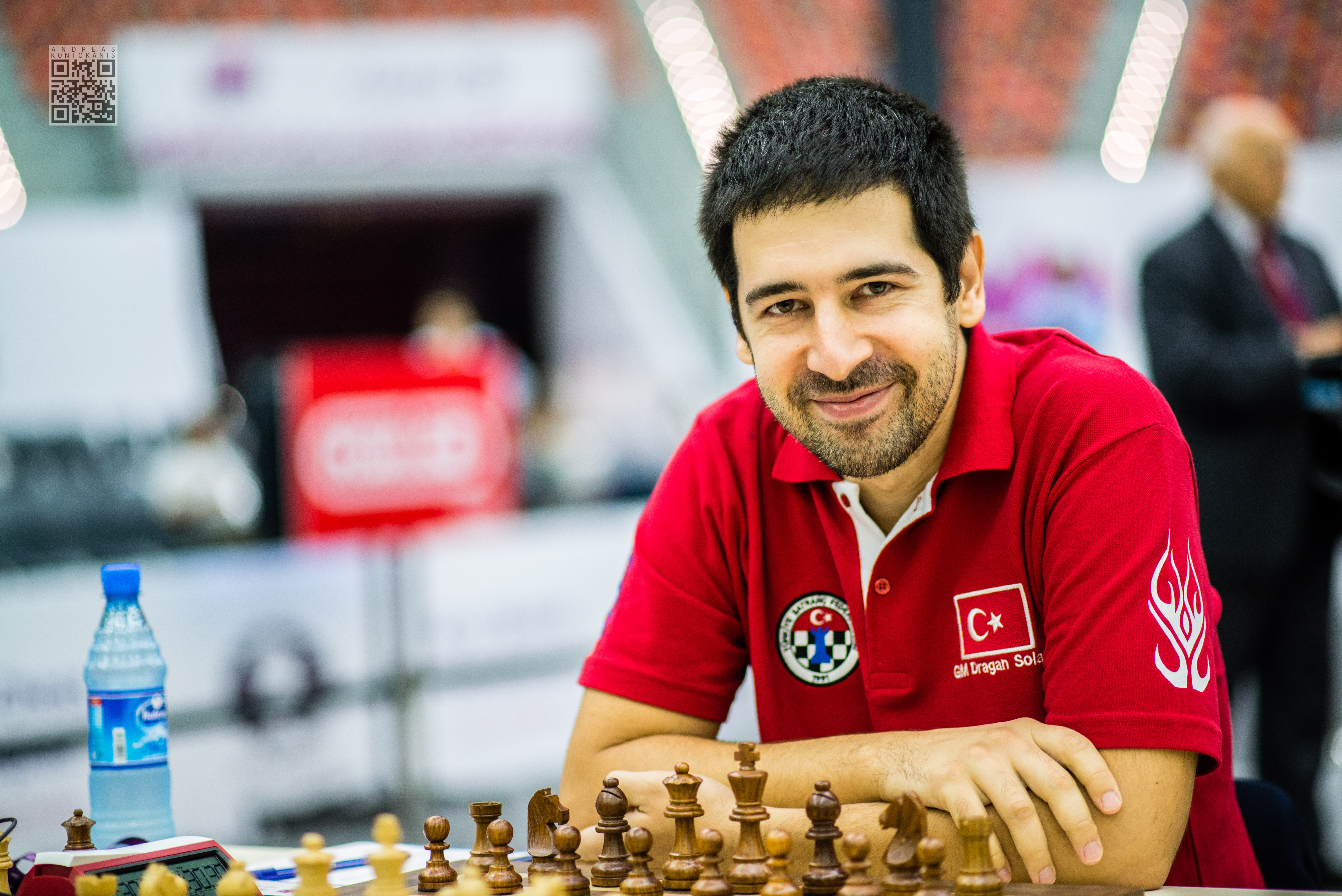 Solak Dragan